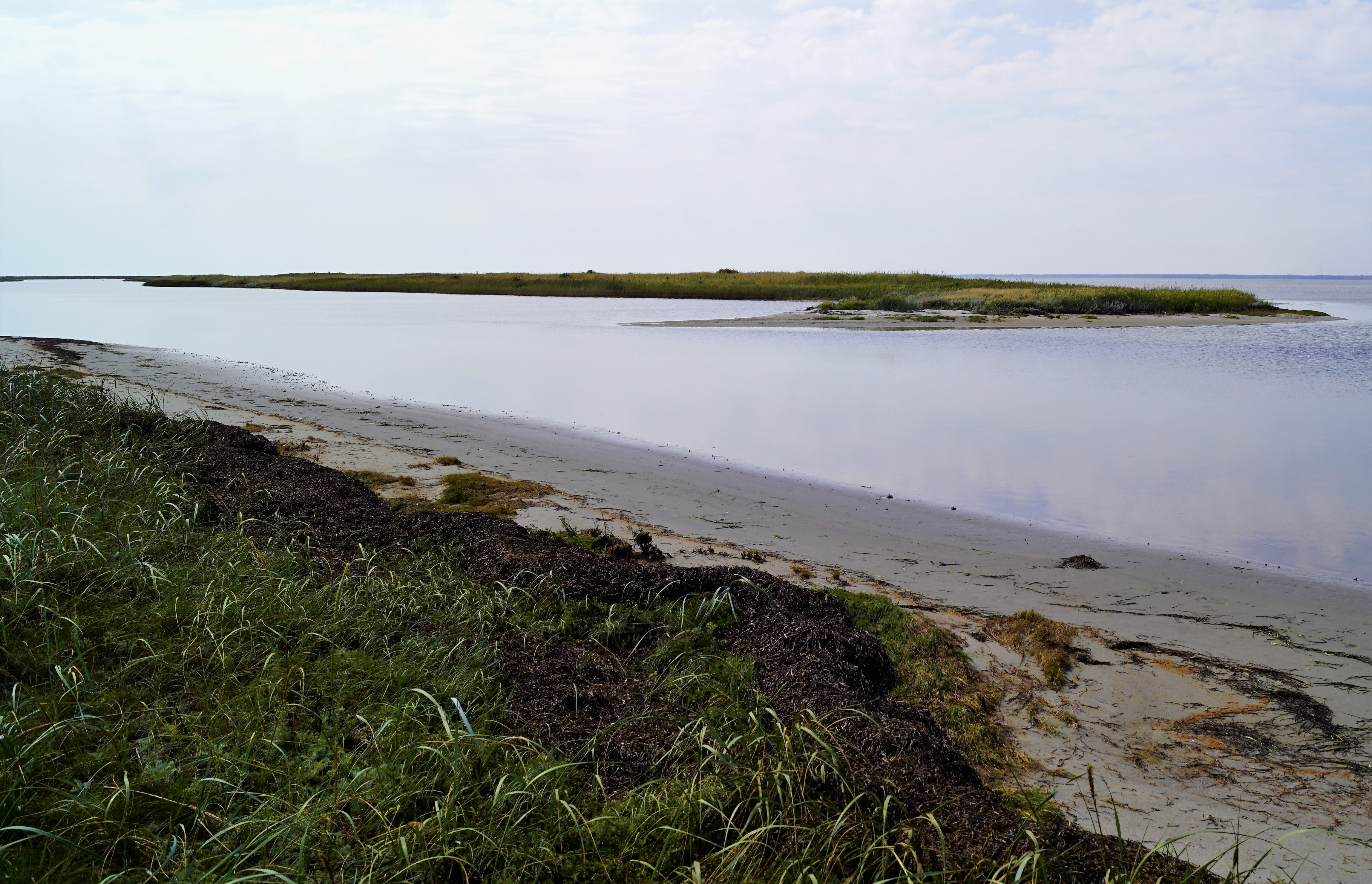 Store Knot set fra nordøst